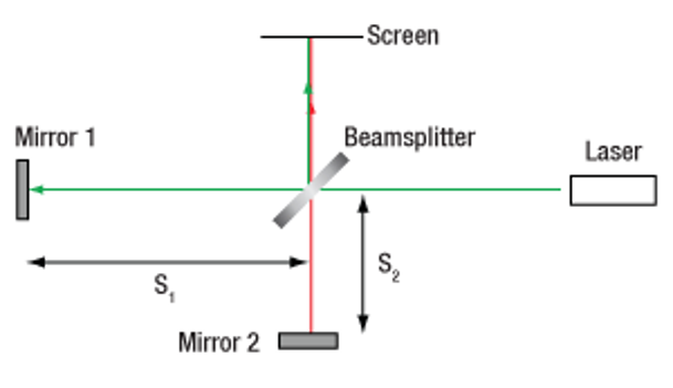 מייקלסון 4